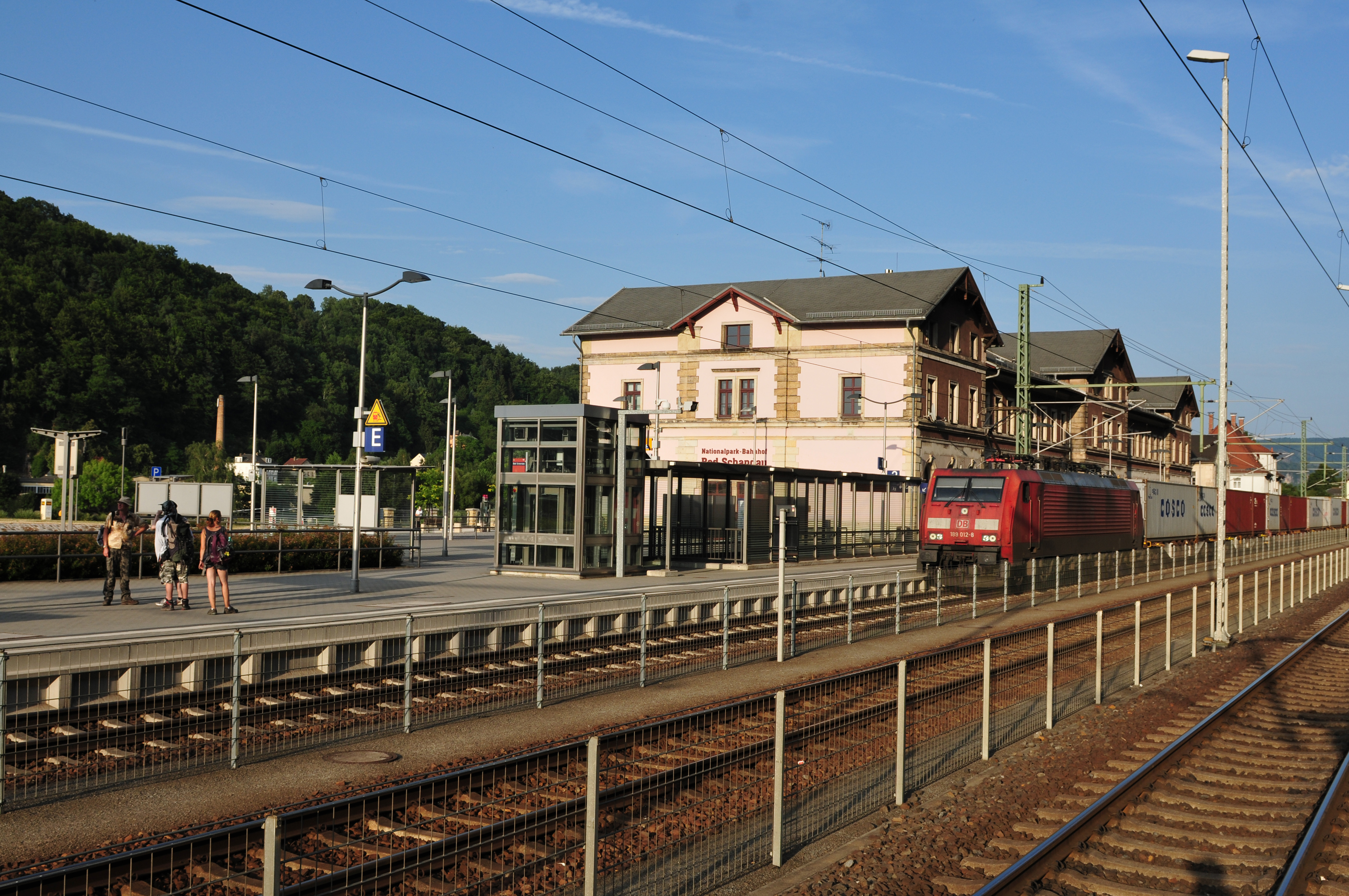 Bahnhof Bad Schandau